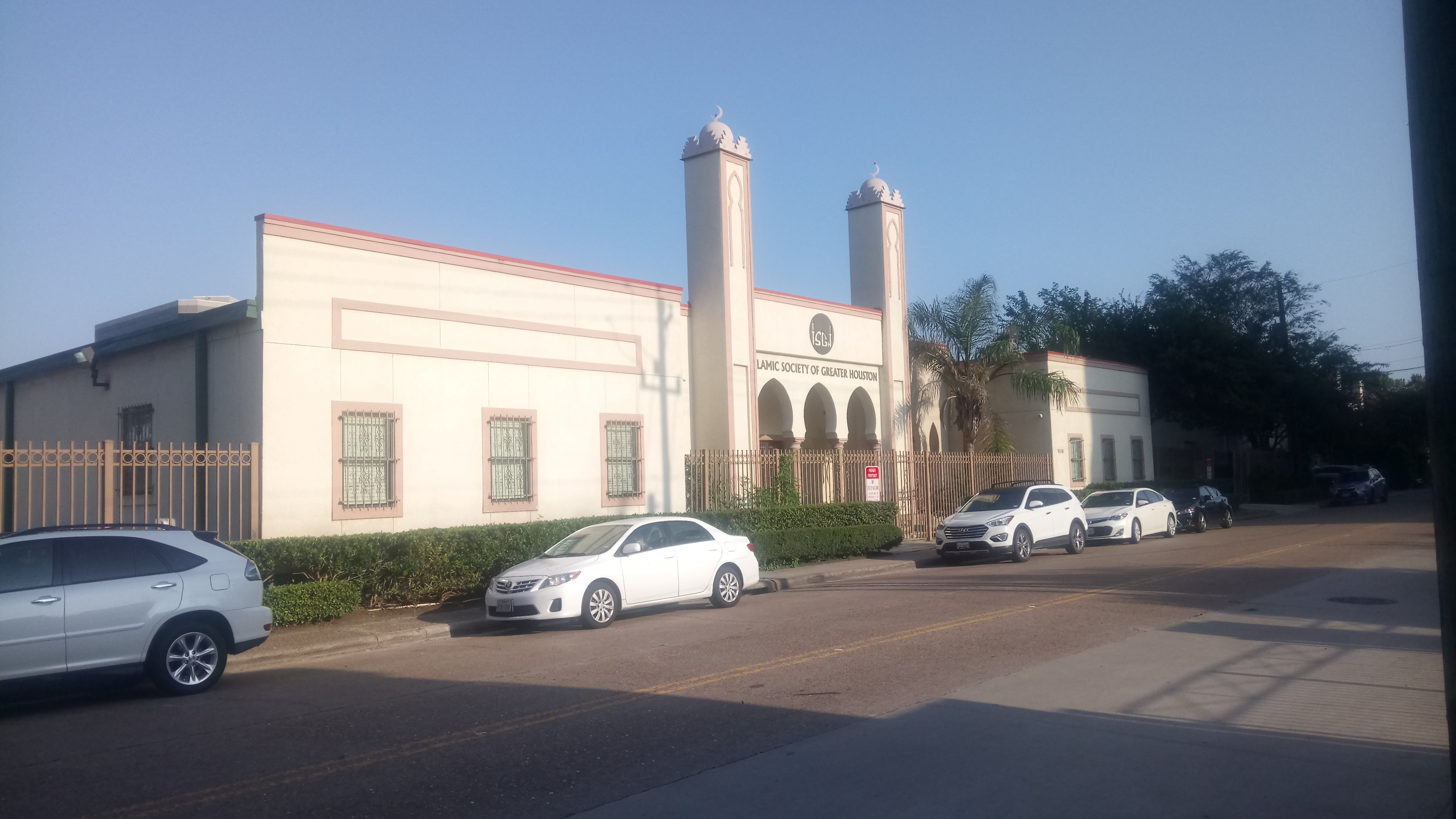 ISGH